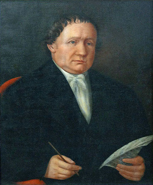 Martin Vogt 1781-1854, Organist und Komponist. Porträt (2), circa 1820